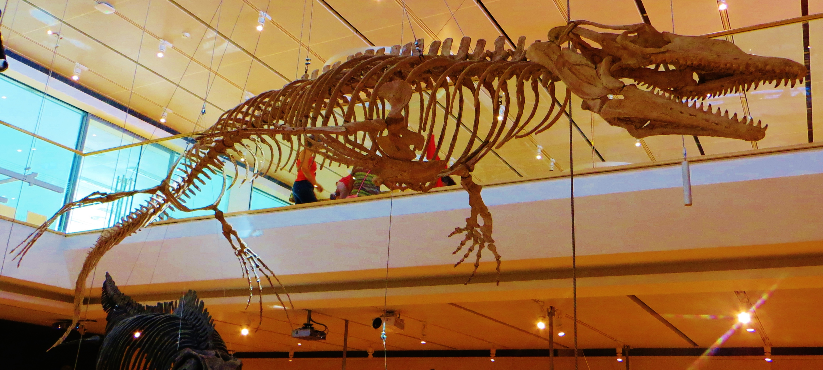 Fossil of Halisaurus, an extinct reptile- Took the picture at Muse (Trento)